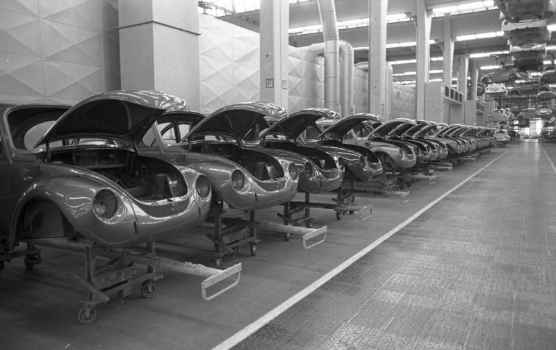 VW-Werk, Wolfsburg Lakiererei